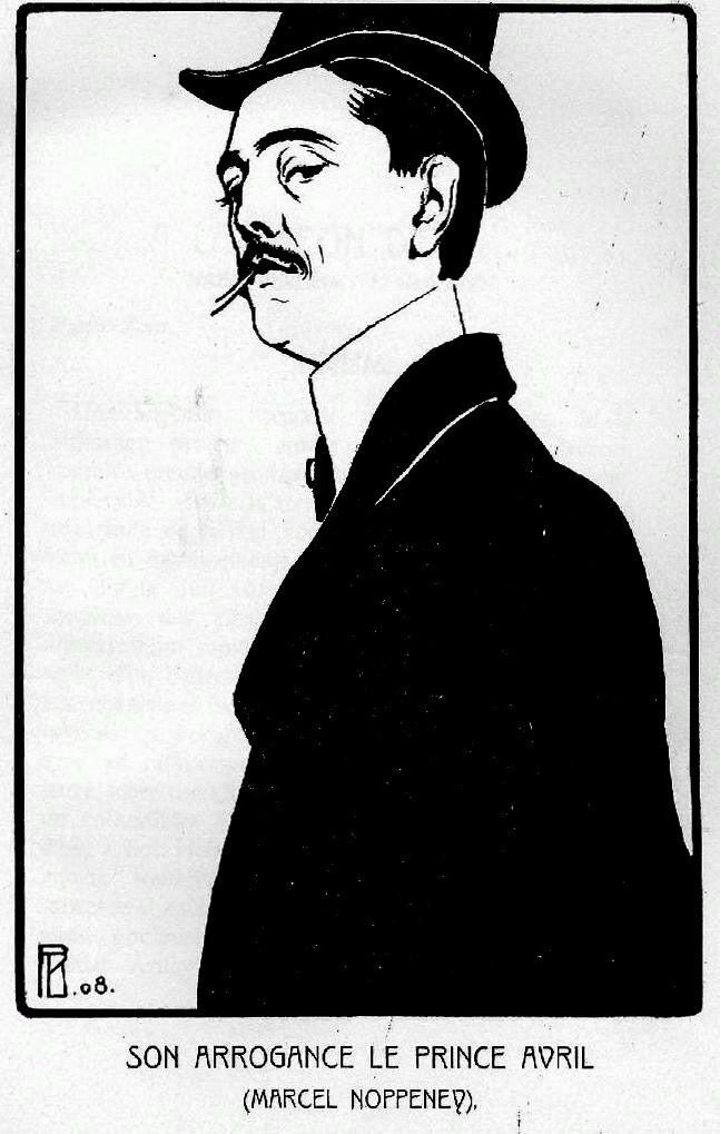 De Marcel Noppeney (Zeechnung vum Pierre Blanc vun 1908)